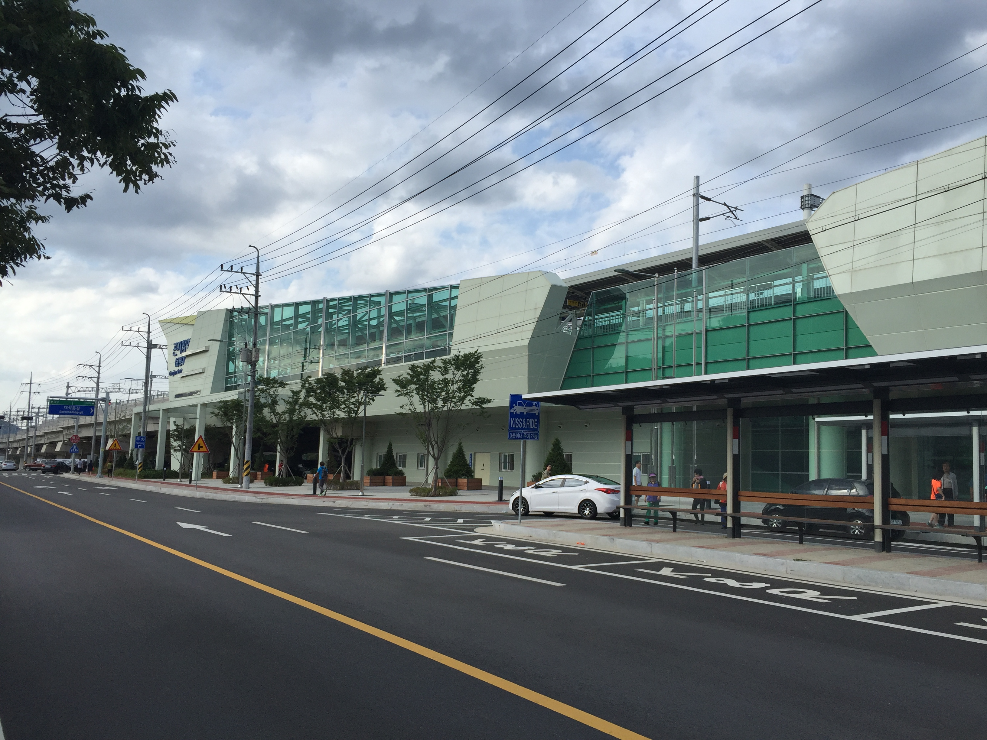 곤지암역 외관입니다.